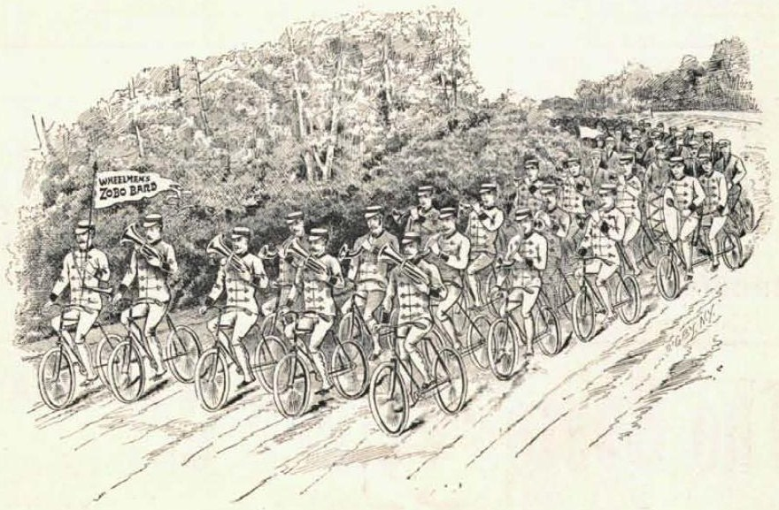 La Zobo Band du Century Wheelmen's Club de Philadelphie défile à vélo en jouant du zobo (imitation américaine du bigophone français).